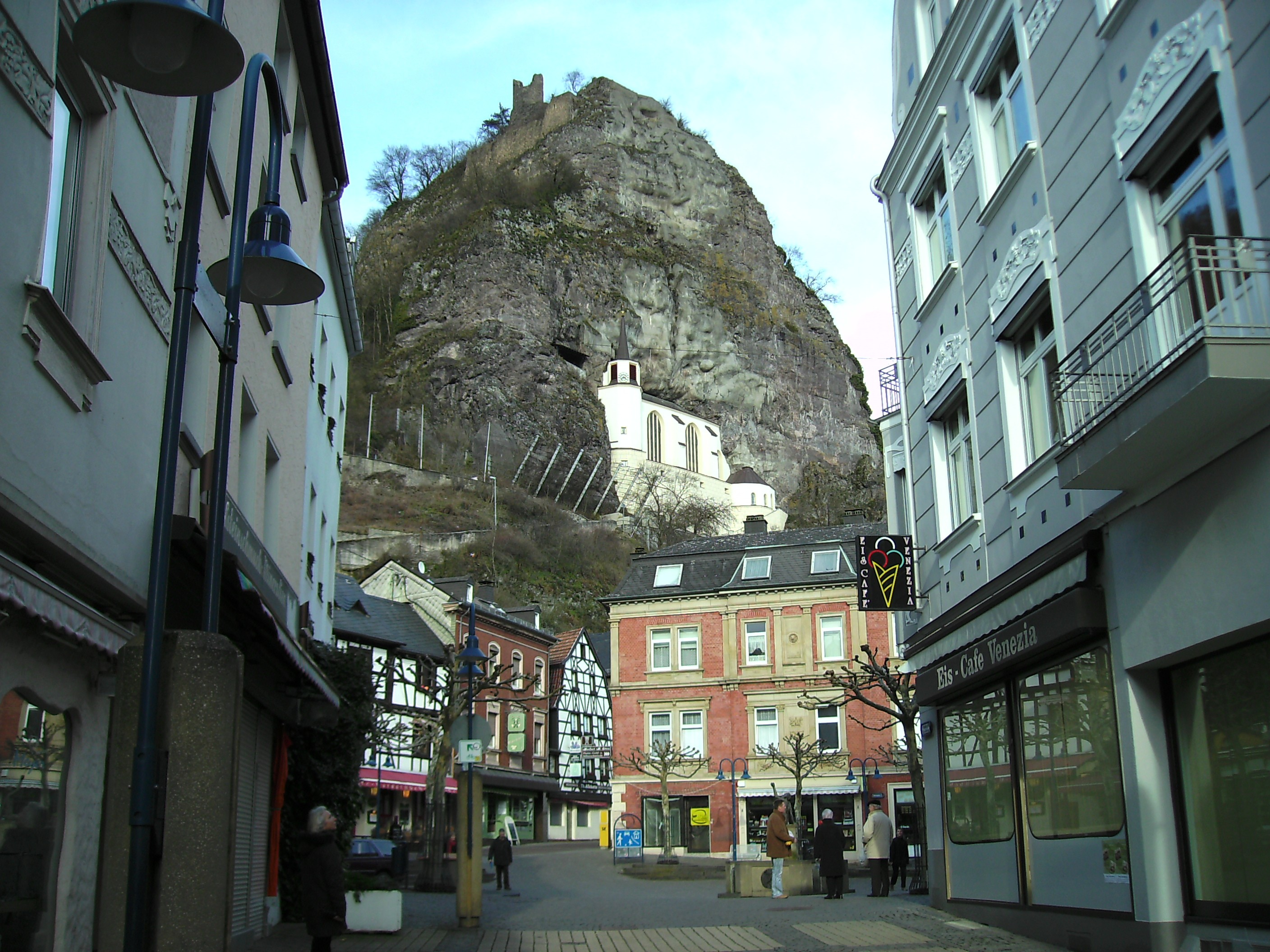 Idar-Oberstein: Altstadt mit Felsendom